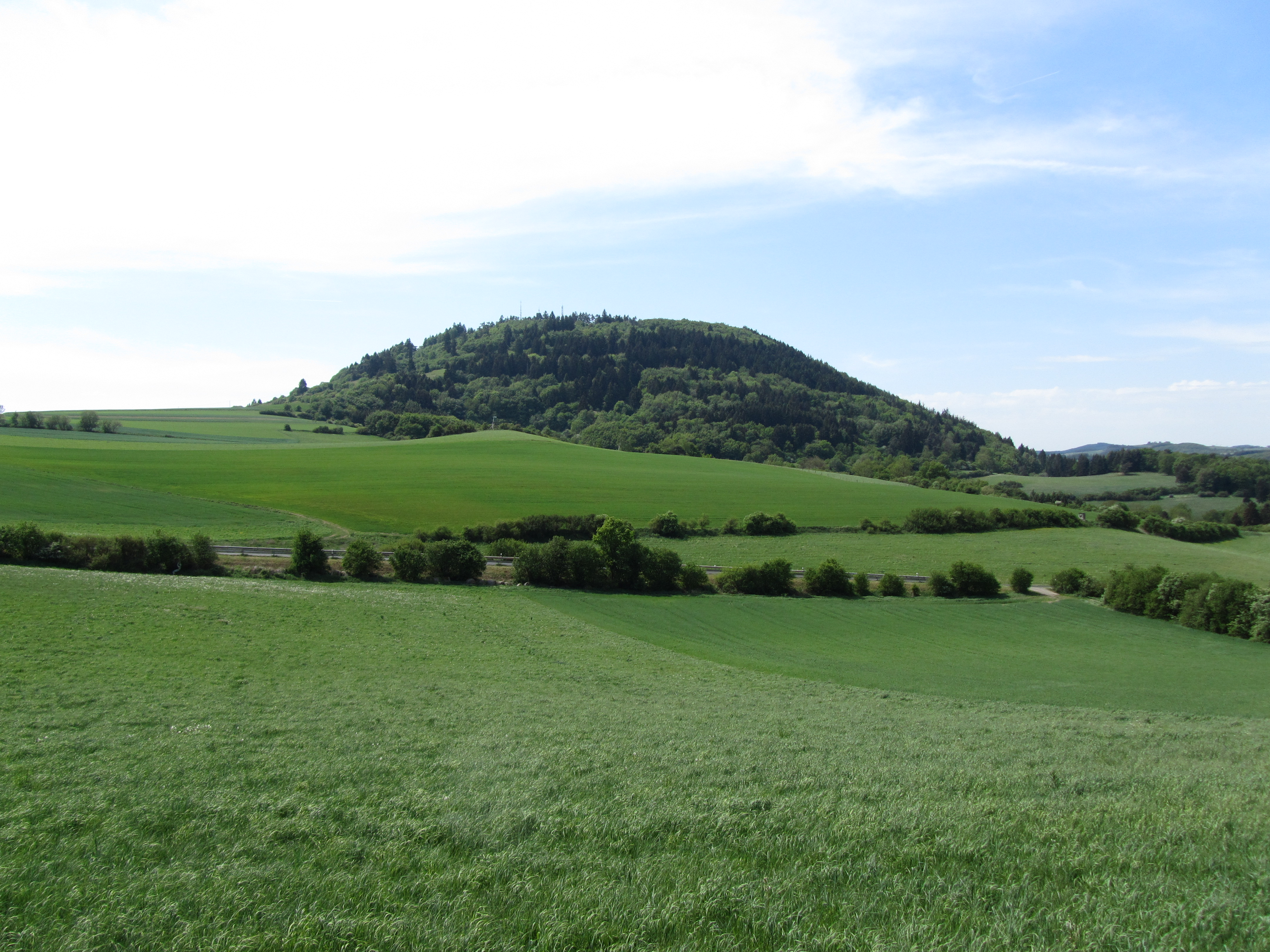 Hochsimmer (588 m) von Ostnordost.